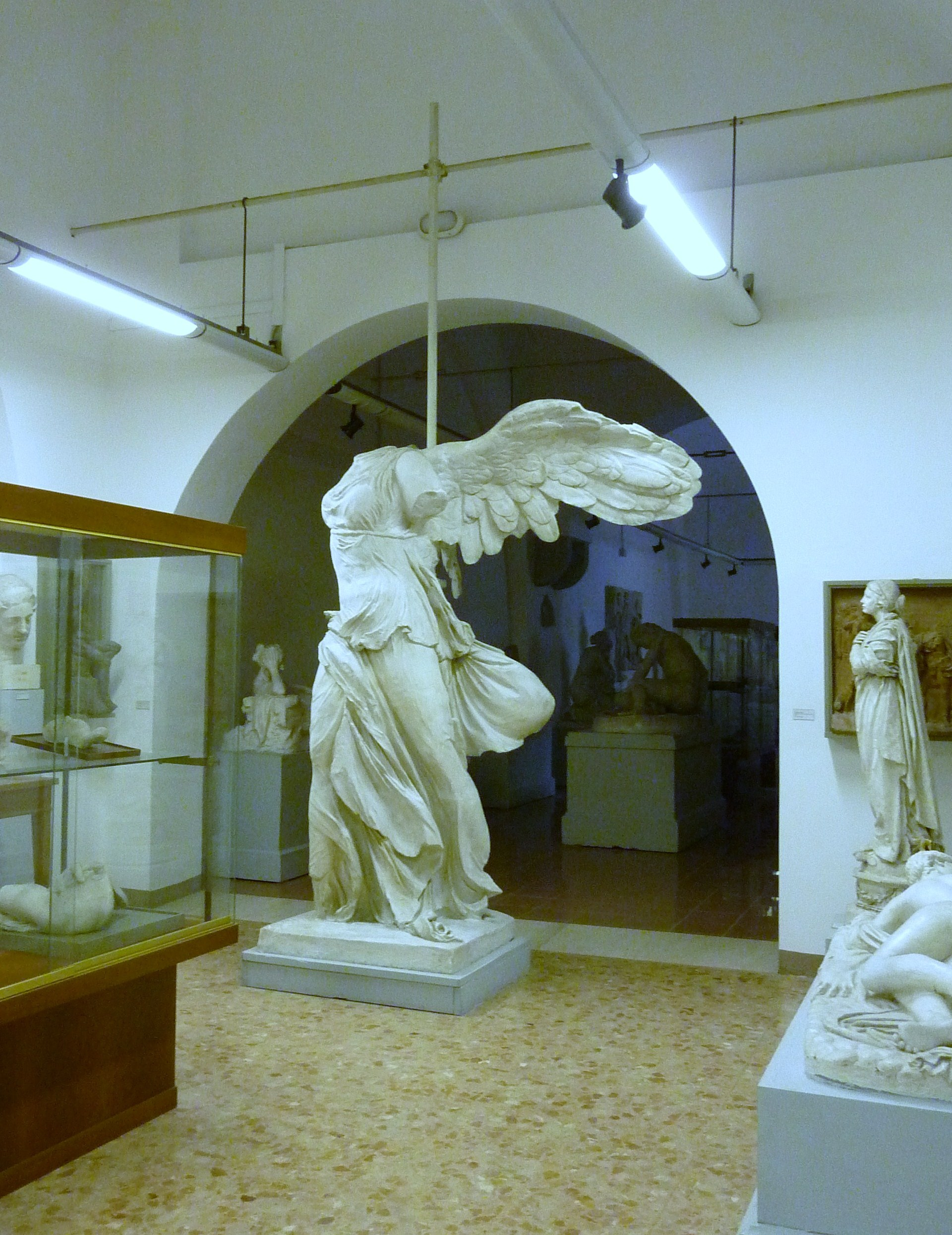 Copia in gesso della Nike di Samotracia nella Gipsoteca del Liceo artistico Paolo Toschi di Parma.